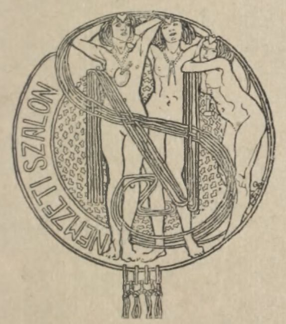 A Nemzeti Szalon emblémája 1912-ből